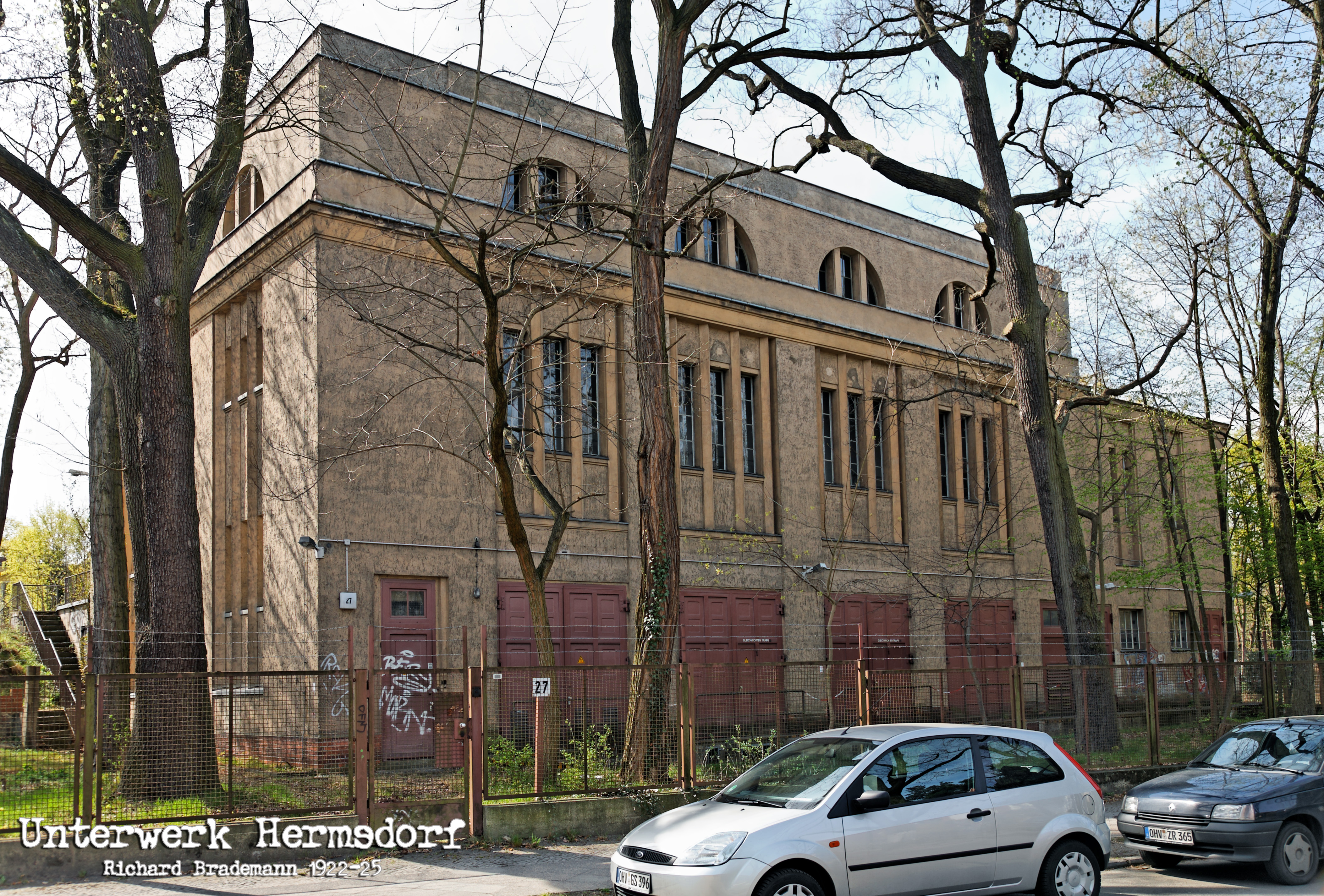 S-Bahn Umformerwerk Hermsdorf im Norden Berlins